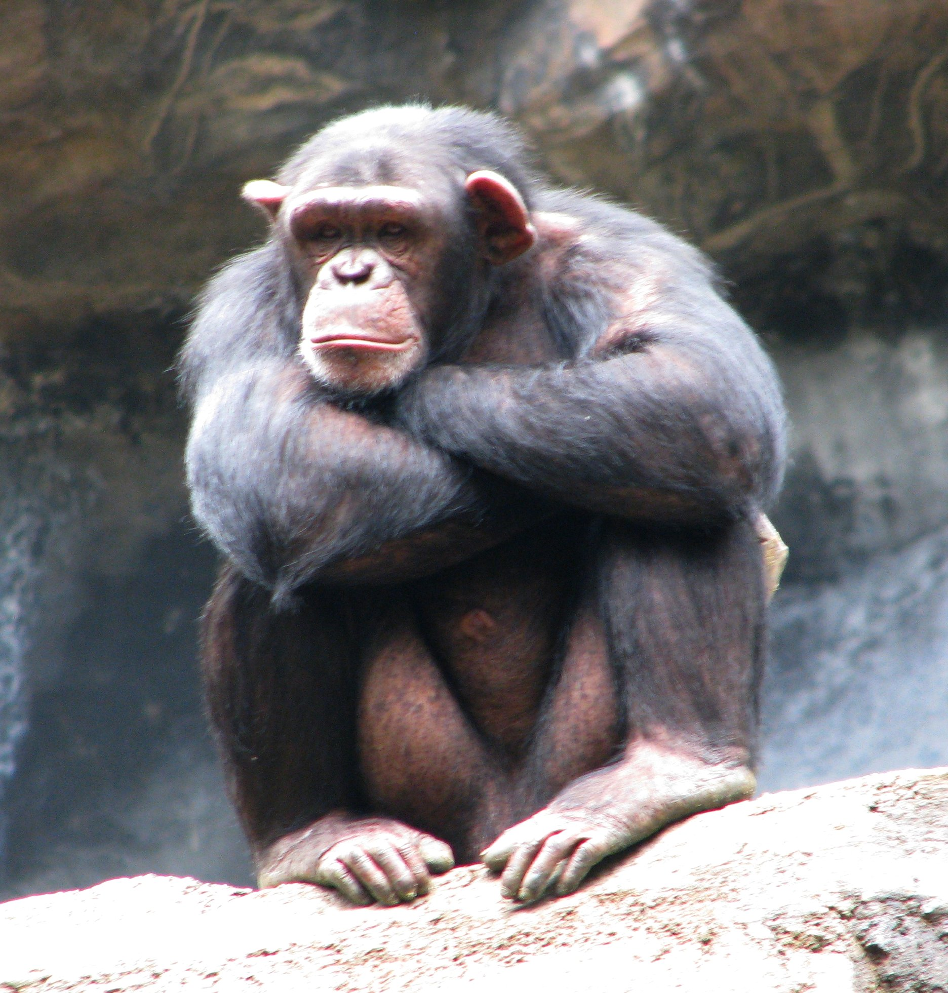 Chimpanzee